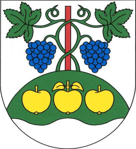 Žalhostice, znak